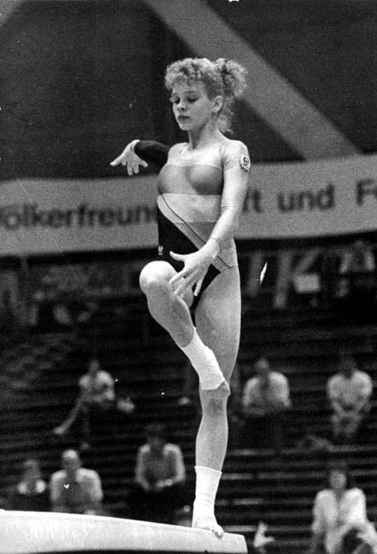 Dagmar Kersten ADN-ZB Gahlbeck 22.7.88-B-Leipzig: 40. DDR-Turnmeisterschaften -Nach dem Pflichtwettbewerb liegt die Mehrkampf-WM-Dritte von Montreal, Dagmar Kersten (SC Dynamo Berlin), mit 38,90 Punkten in Führung.